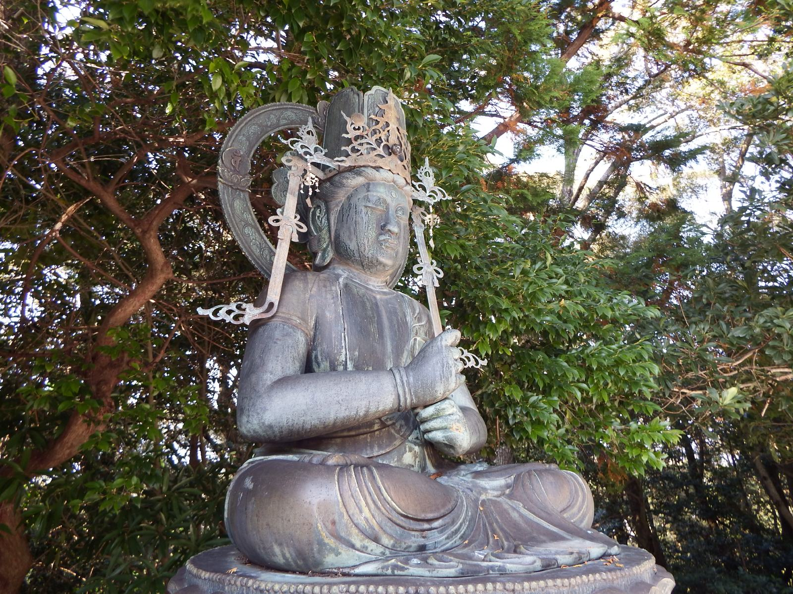 大日寺（高知県）の大日如来